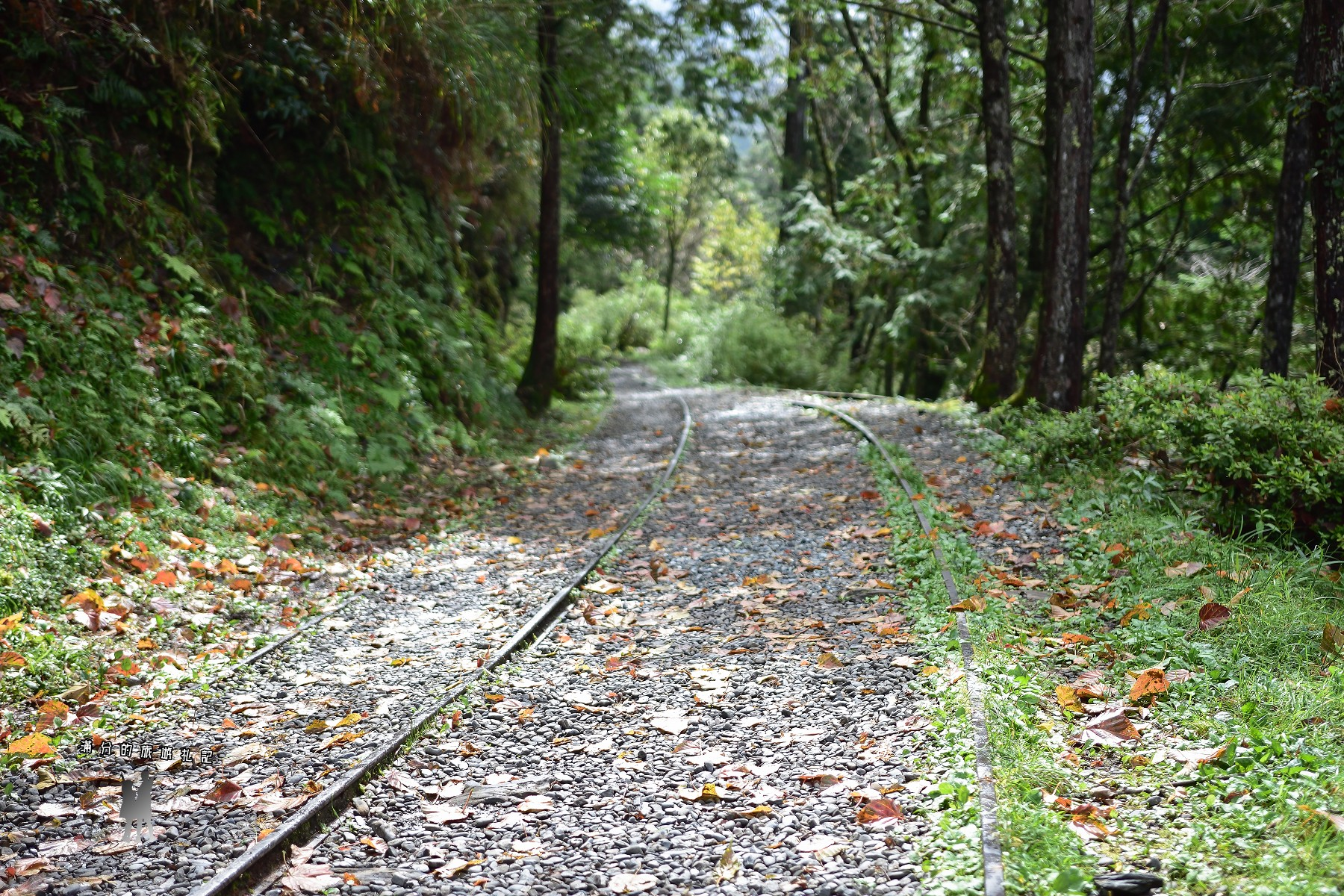 宜蘭-太平山-見晴古道